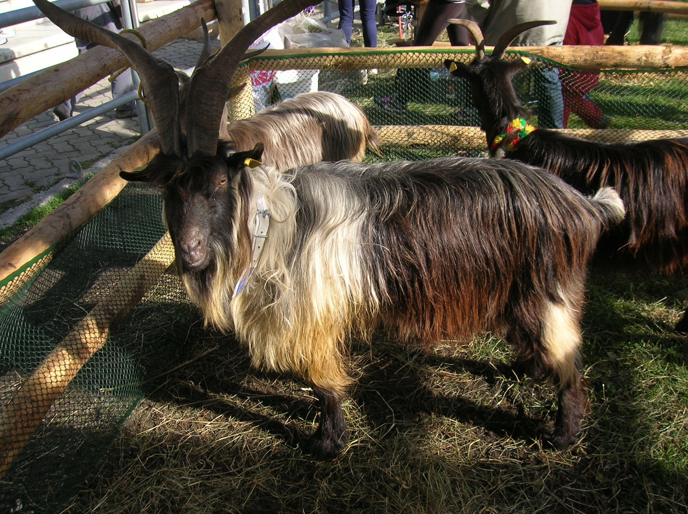 Razza Orobica. Fête des Alpes 2011, Aosta.